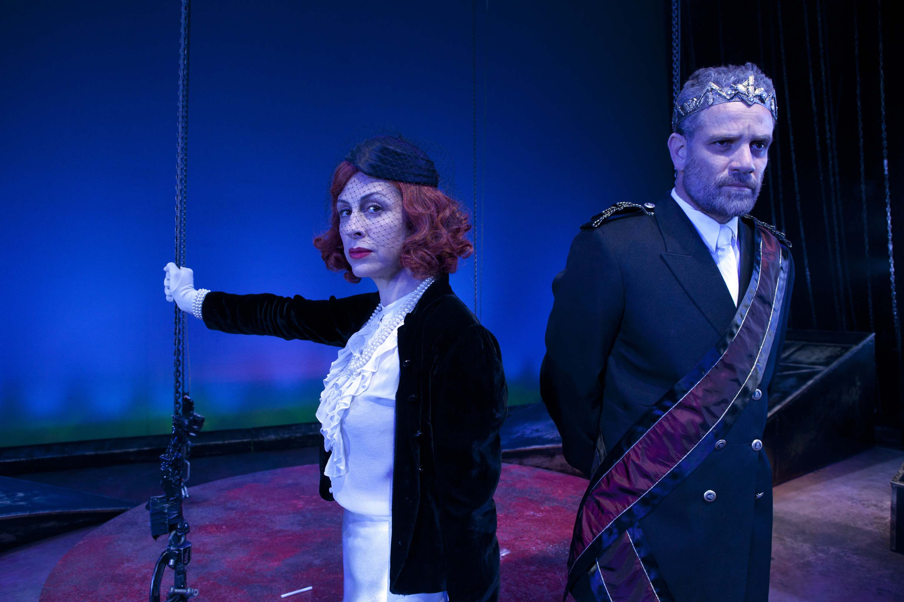 אפרת בן-צור ומיקי לאון - הנסיכה איבון - 2010